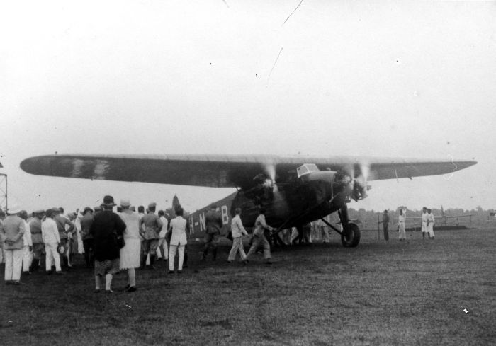 Repronegatief. Opening van de eerste luchtlijn van de K.N.I.L.M. op Semarang en Bandoeng in november 1928 op vliegveld Tjililitan bij Batavia, Java